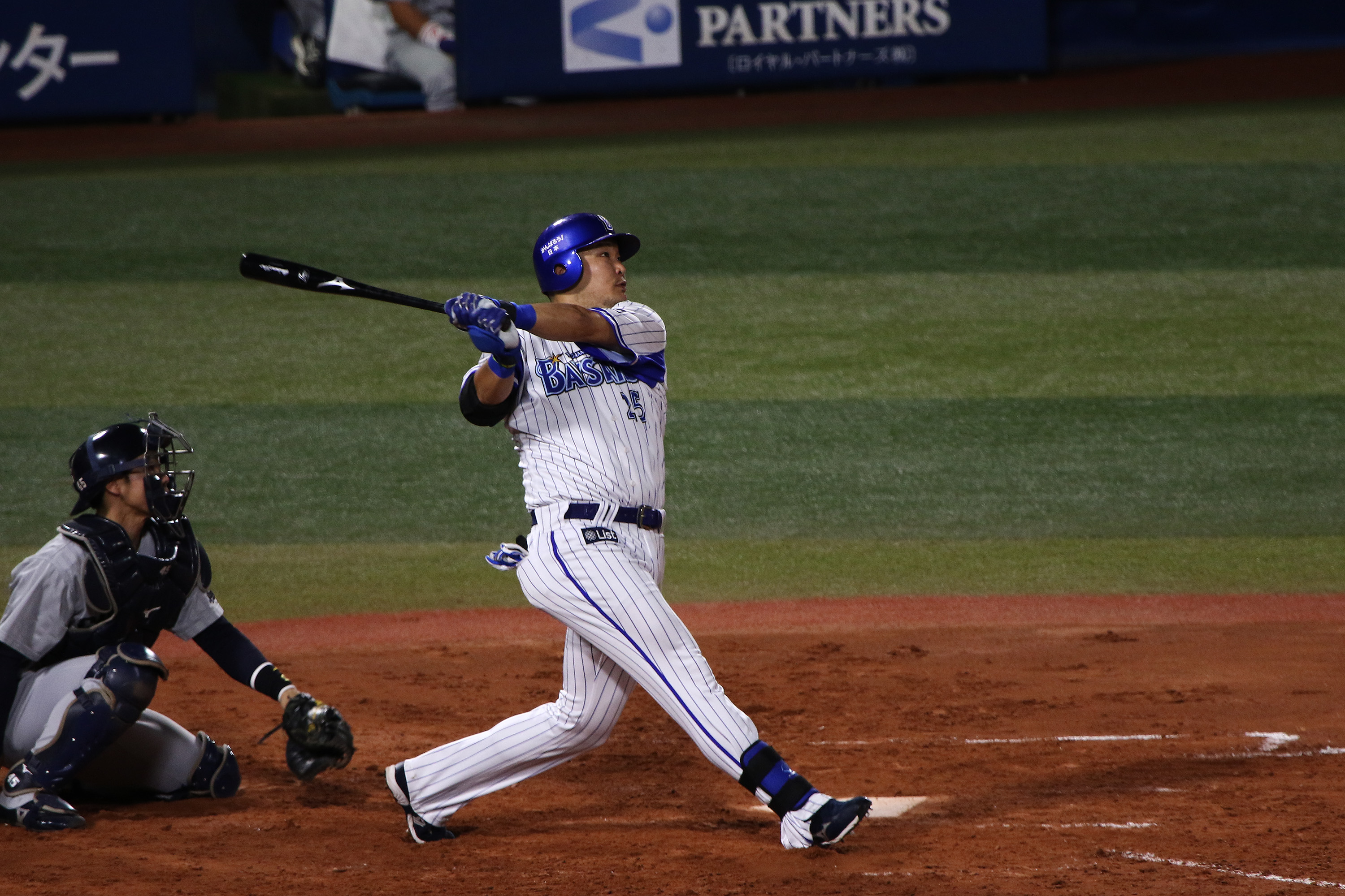 横浜DeNAベイスターズの筒香嘉智。2015年9月22日撮影